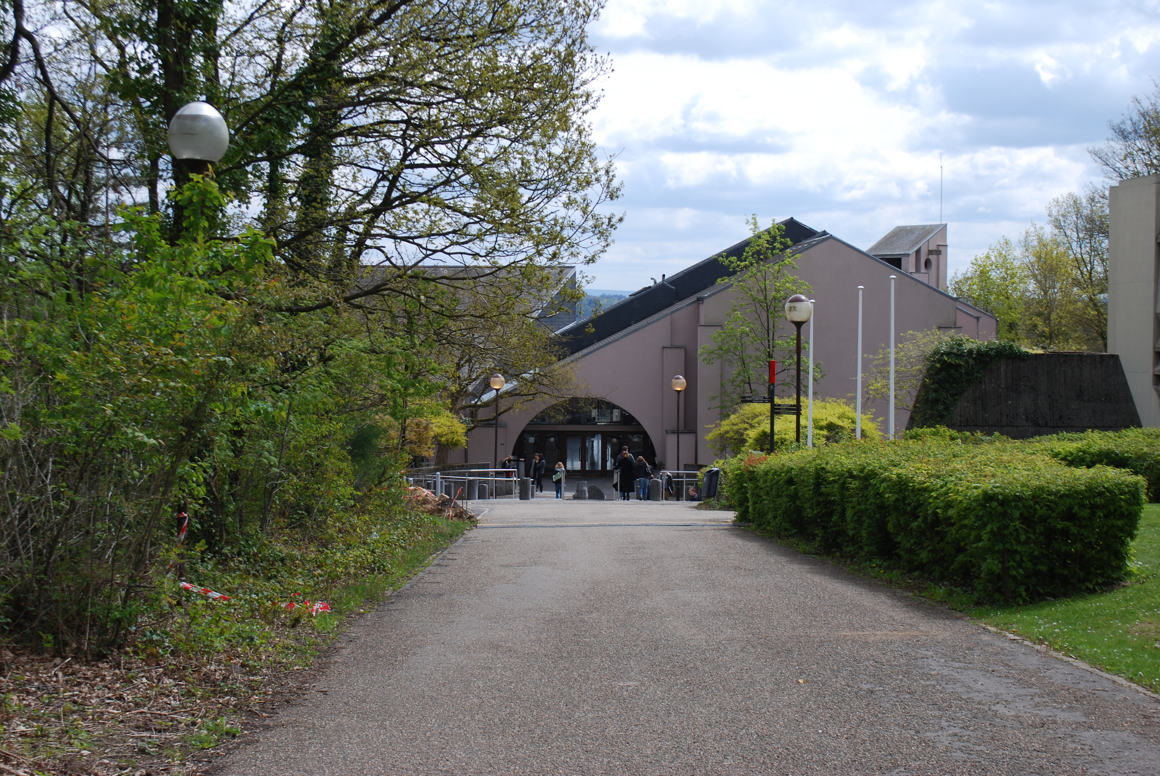 Vue du quartier Agora, dans le domaine de l'université de Liège au Sart Tilman